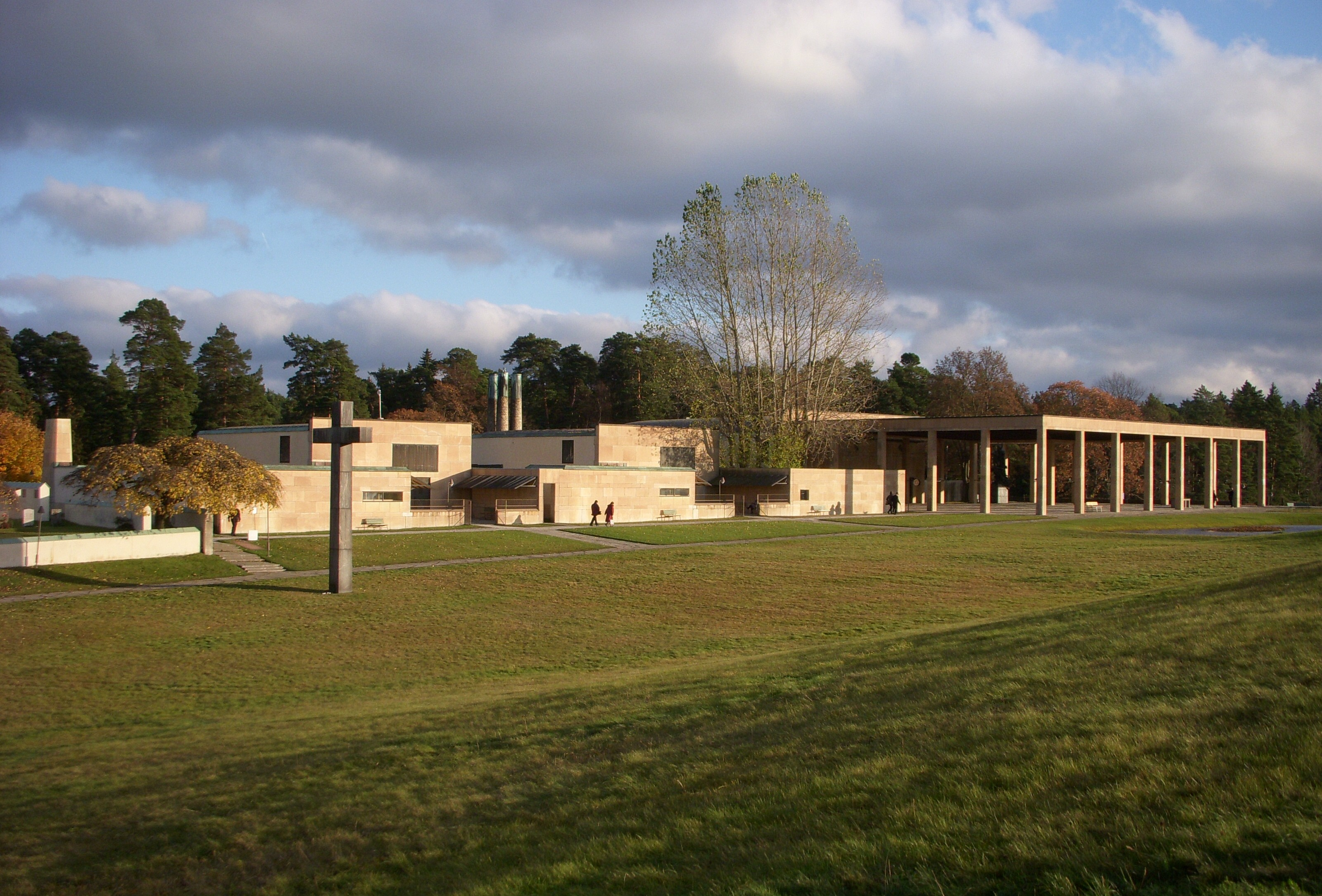 Skogskrematoriet på Skogskyrkogården vy från Meditationslunden